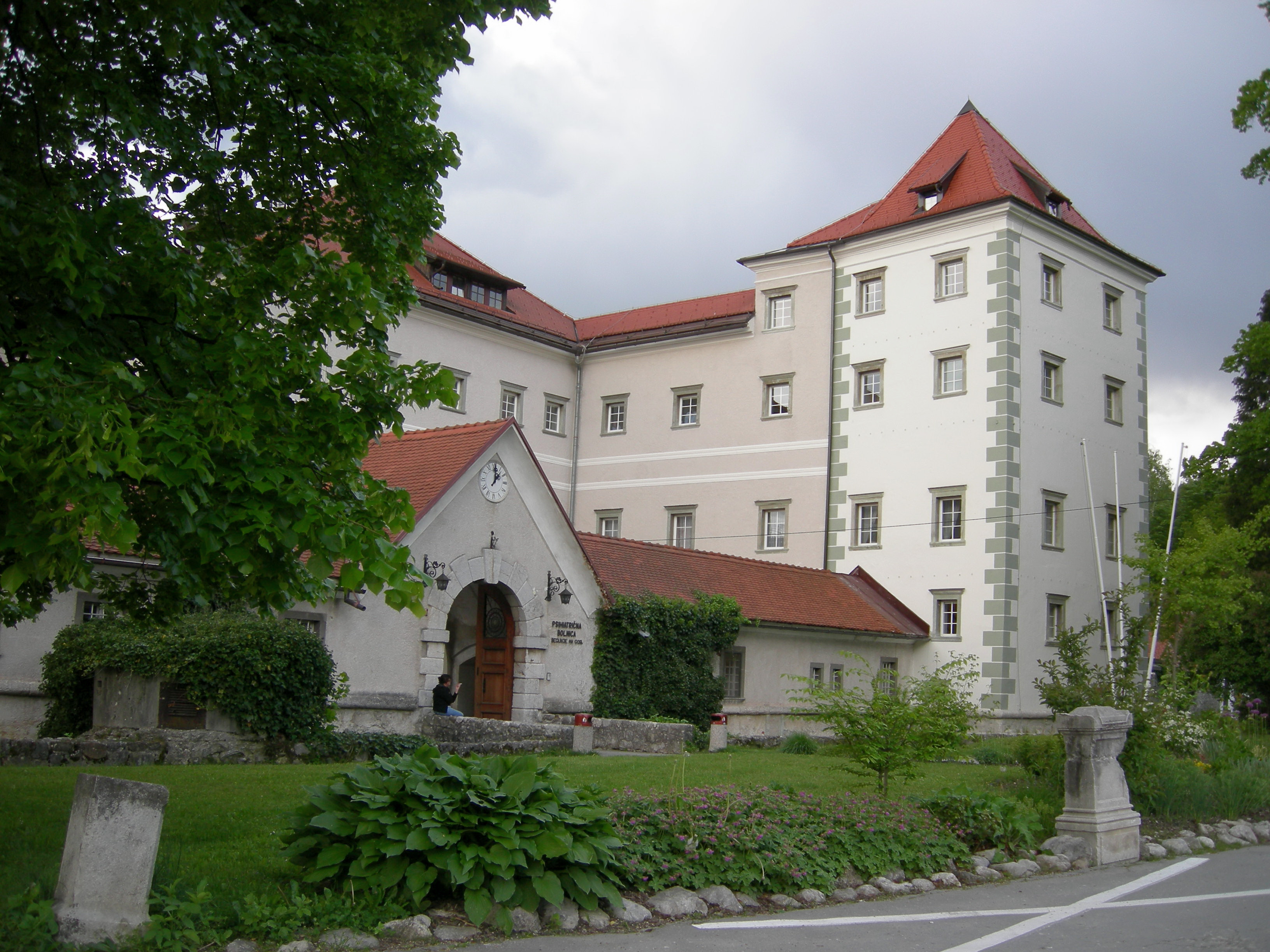 Grad Kacenštajn, Castle Kacenštajn, Begunje na Gorenjskem, Slovenia